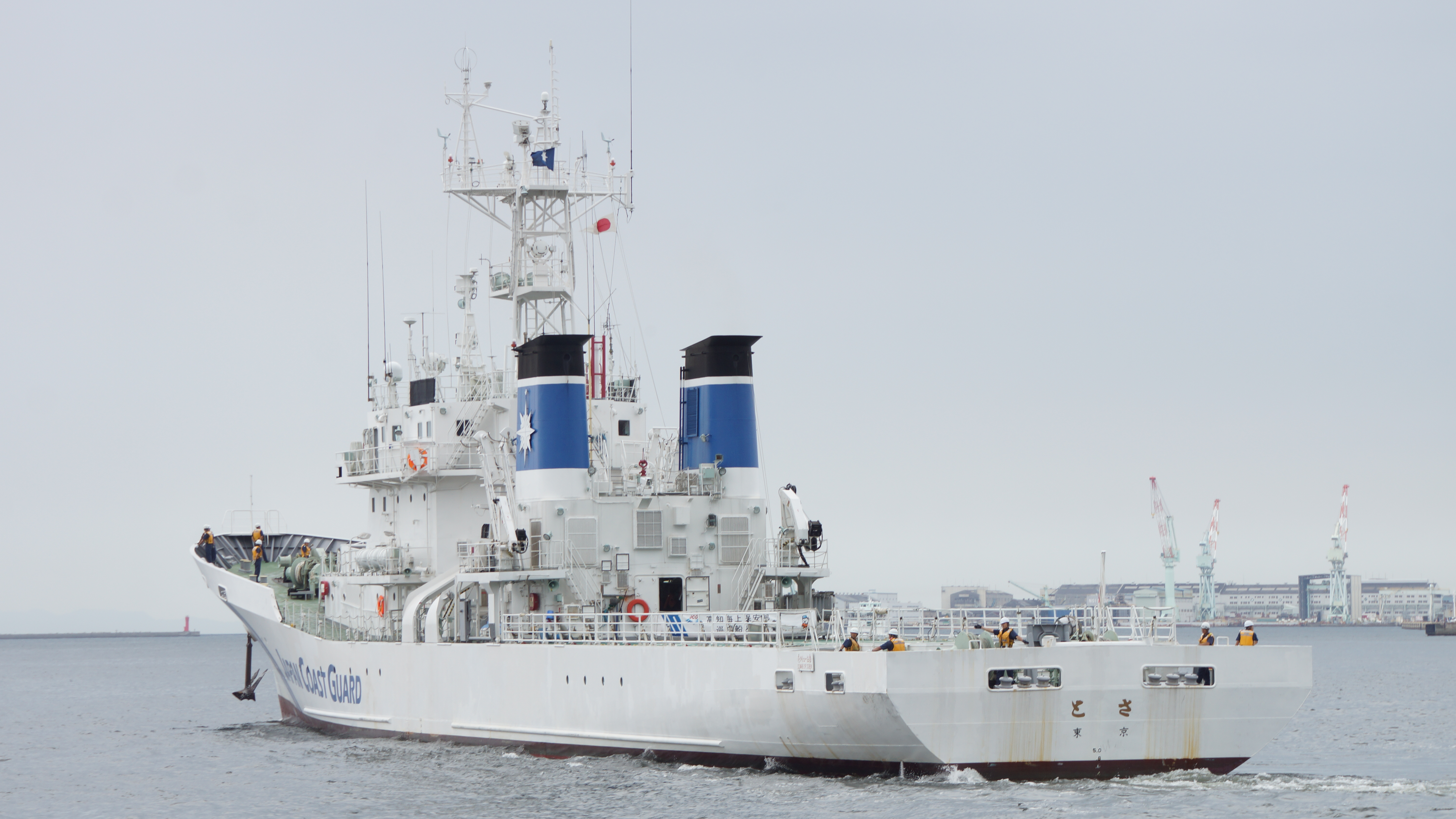 海上保安庁 巡視船とさ（PL-08） 左舷後部。2017年7月23日 神戸港にて。